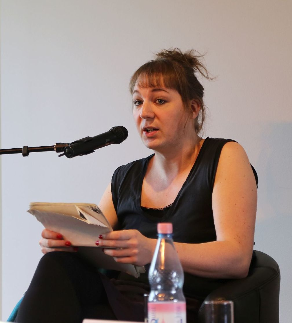 «Wie endlich alles anders wird» 10:15 Uhr Kommunismus für Erwachsene und Kinder ab 9 mit Musik. Mit Bini Adamczak Wie weiter mit Blockupy? 14:30 Uhr Organisierung und Protest gegen Krise und Prekarität in Europa. Mit Thomas Seibert, Werner Rätz, Jana Seppelt und Moritz Warnke Wie über Zukunft sprechen? Die Notwendigkeit einer radikalen ökosozialistischen Perspektive 17 Uhr Mit Elmar Altvater und Raul Zelik Berlin, 25.4.2015 Im Rahmen der Linken Woche der Zukunft